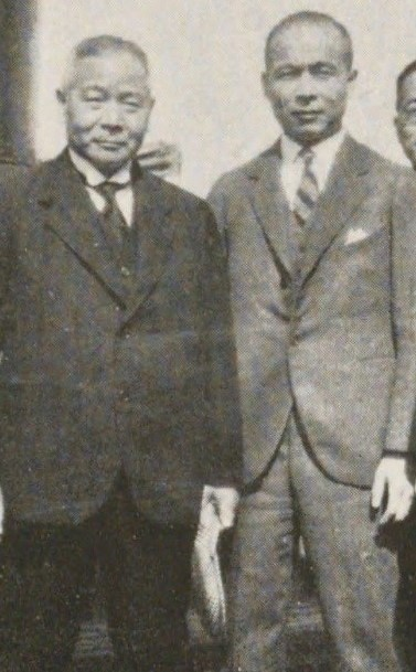 岩崎清七と長男の清一郎